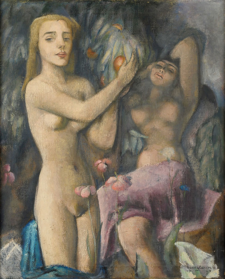 Der Traum